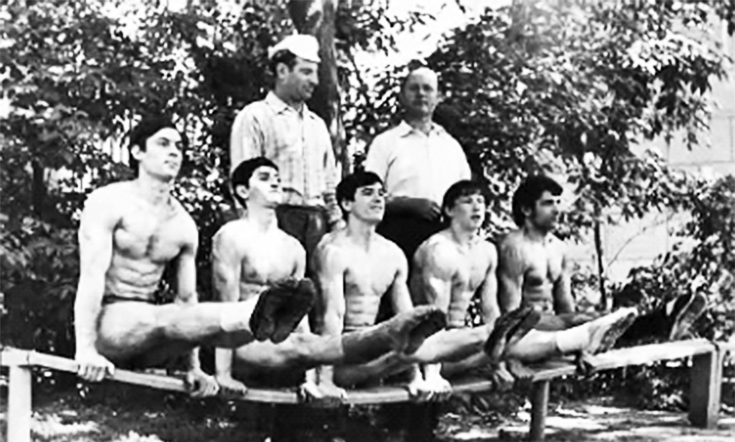 Тренер Вассерман Ким Ефимович со своими воспитанниками спортшколы города Грозного. 1974